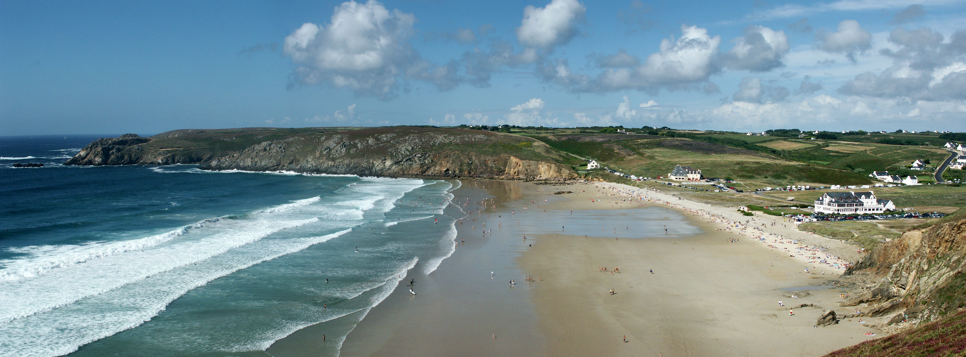 Plogoff (Brittany, France); Baie des Trépassés